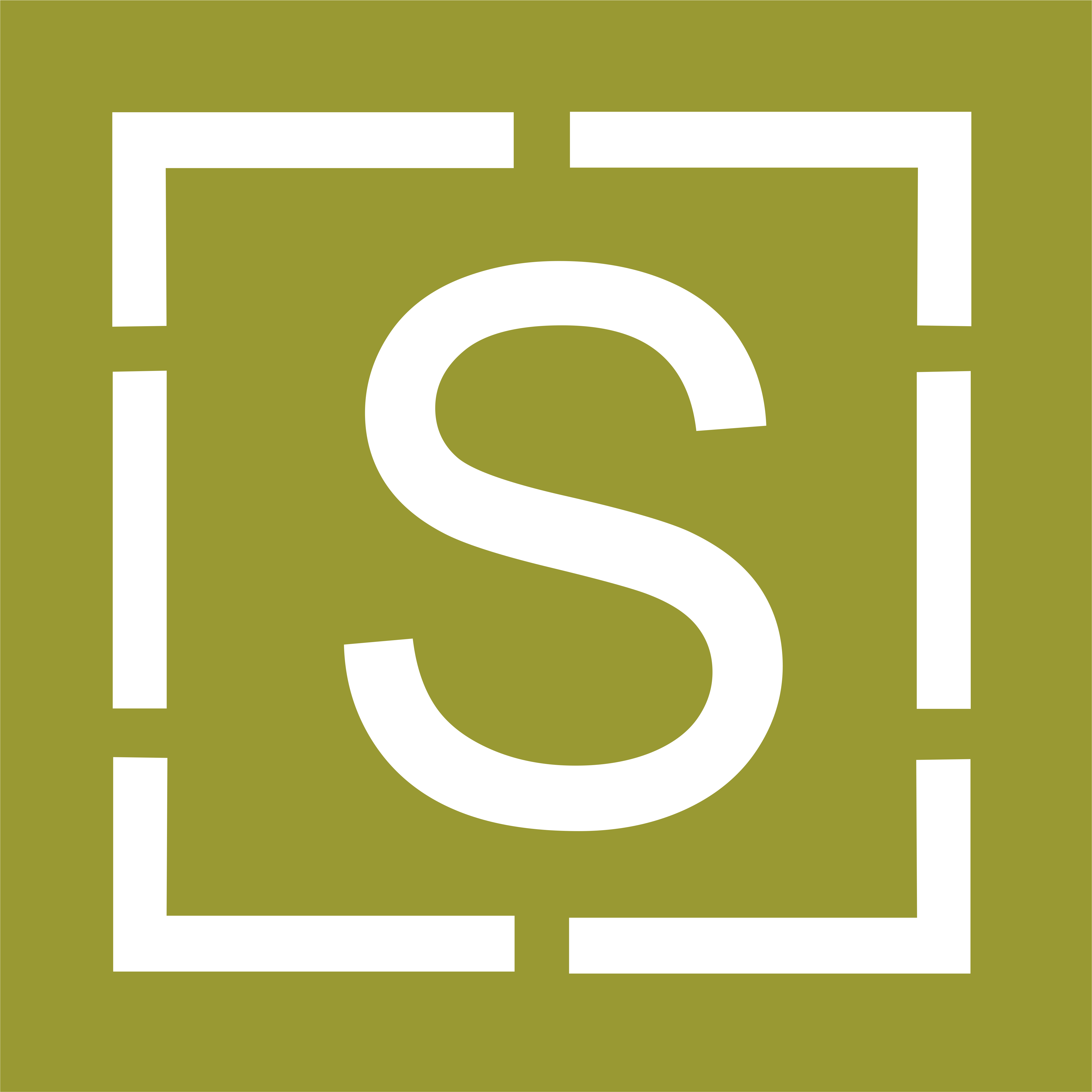 Znak taktyczny malowany na pojazdach 5 batalionu saperów, 4 Dywizji Zmechanizowanej